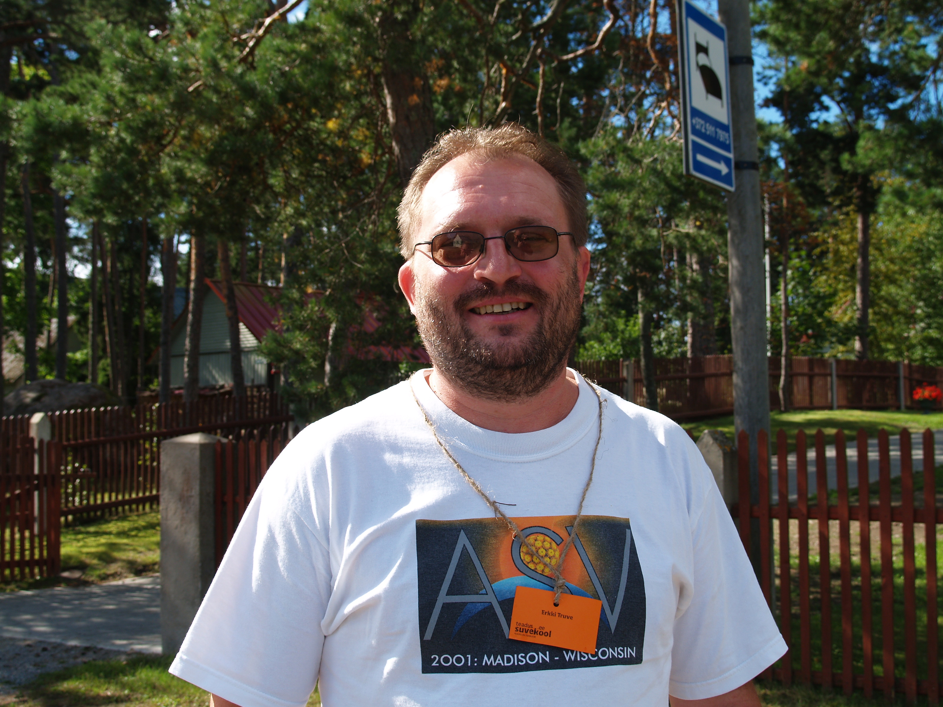 Erkki Truve teadus.ee suvekoolis Käsmus.